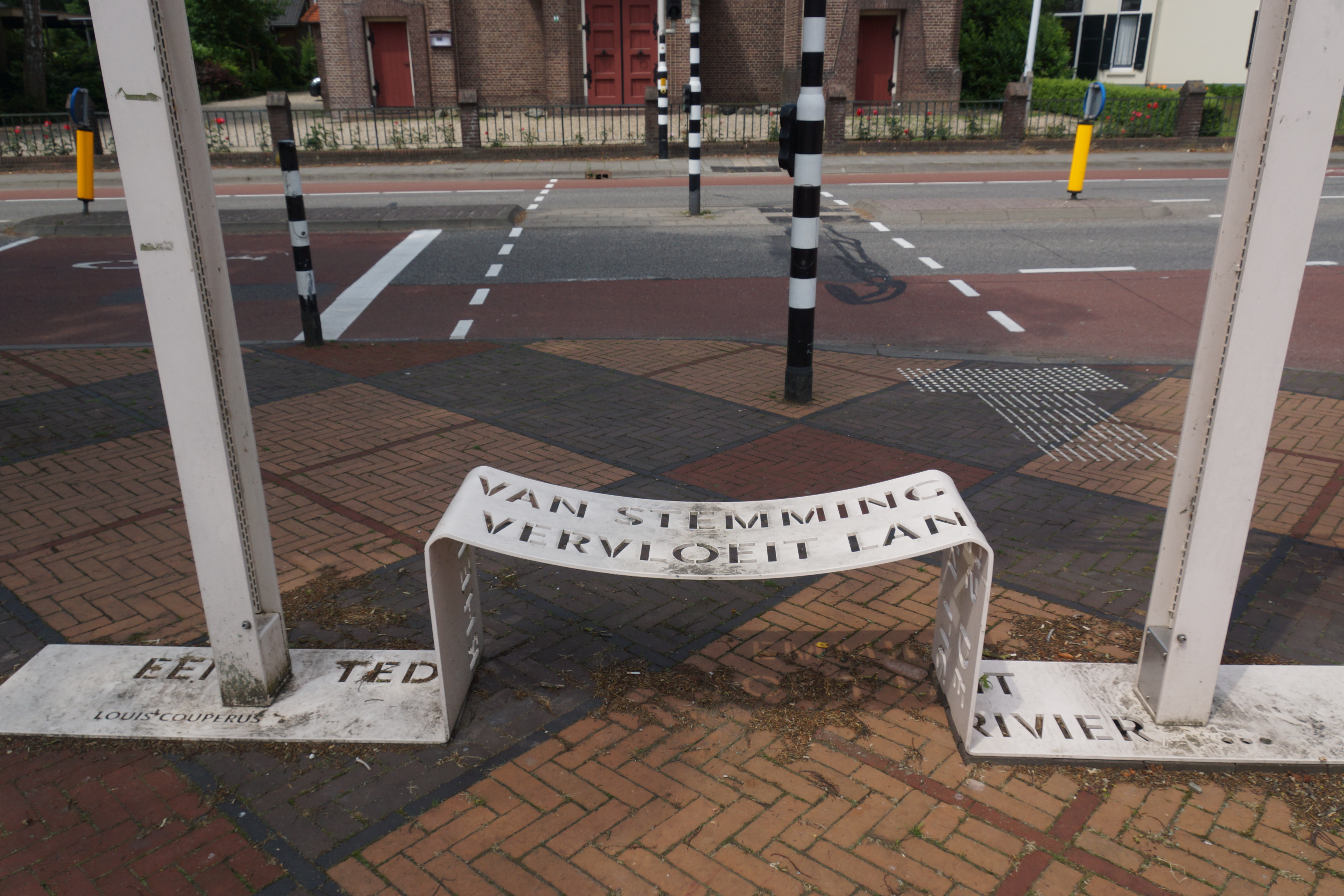 De Steeg Amaliaplein 150624 (23)